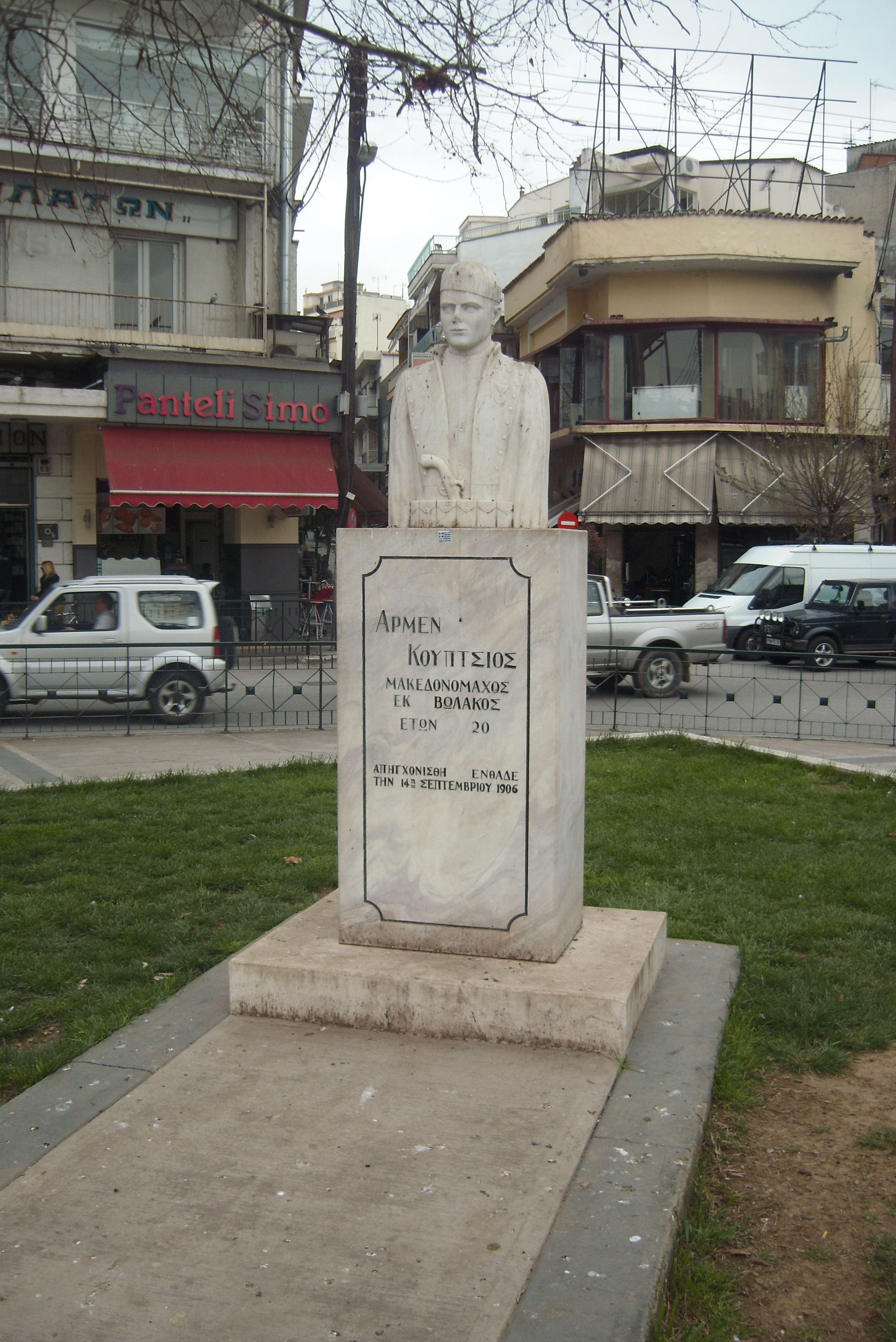 Паметник на Армен Купциос в град Драма.